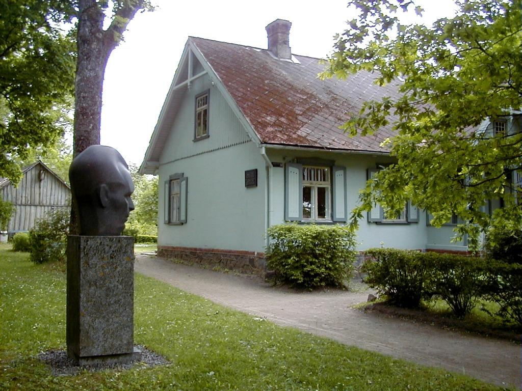 Skrīveri, A. Upīša memoriālā māja 2000-05-28